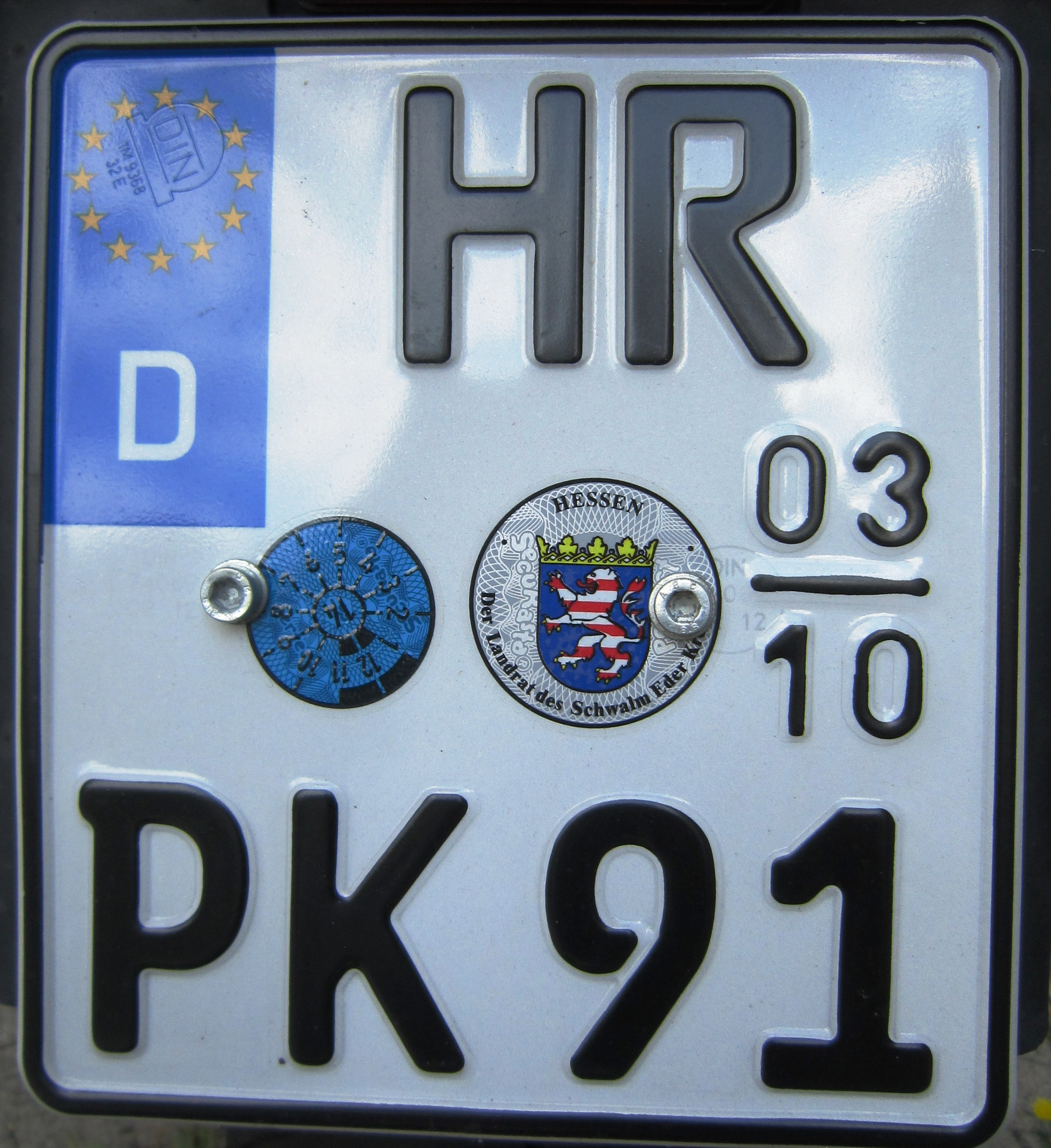 Kentekenplaat geldig van maart tot oktober Duitsland